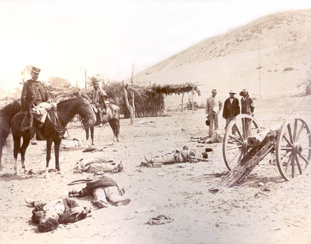 Chorrillos Batle, Batalla de Chorrillos. Raúl Olmedo D. dijo...: "Martiniano Urriola no era militar, sino oficial (coronel) de la Guardia Nacional. No obstante, el desarrollo de los sucesos de la GDP le permitieron tener, en noviembre de 1979, el mando de las tropas acantonadas en Dolores hasta poco antes de la batalla de ese nombre. Asimismo, sus condiciones notables de mando le significaron el mando de la II Brigada de la III División (Lagos) en la Campaña de Lima. Luego de Chorrillos, parte de esa brigada (puntualmente el "Bulnes", policía de Santiago movilizada en la emergencia bélica) fué destinada a misión sepulturera, y la foto que aquí se publica corresponde al día 14.01.81., en tanto comprobaba la muerte de sirvientes de una posición de artillería peruana. Le acompaña en esa imagen, también montado, (aunque queda de ella fuera por el plano cerrado que se publica) el general Marcos Maturana, Jefe del Estado Mayor del Ejército Expedicionario en esa campaña. El hijo de Urriola, Pedro Urriola, fué el capitán cuyo cadáver, después de la acción de Tarapacá (27.11.79), mereció la publicación del informe de autopsia que hace constar su depase y múltiples heridas post mortem. Tomado del blog de Jonatan Saona "General chileno Marcos 2º Maturana, la fotografía es posterior a la batalla de San Juan (13 enero de 1881), se le aprecia vistiendo un poncho y un cubrenuca Tomado del blog de Jonatan Saona